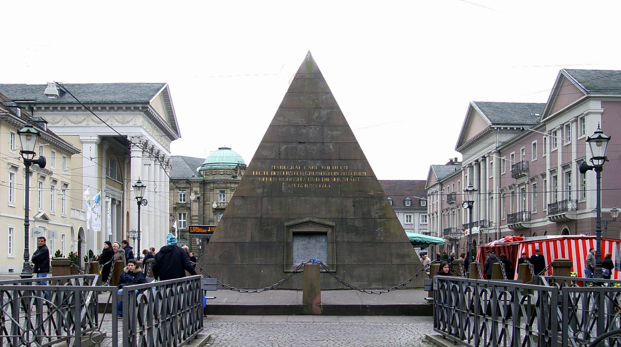 Karlsruhe, Marktplatz mit Evangelische Stadtkirche, Karlsruher Pyramide und Rathaus, alle von Friedrich Weinbrenner